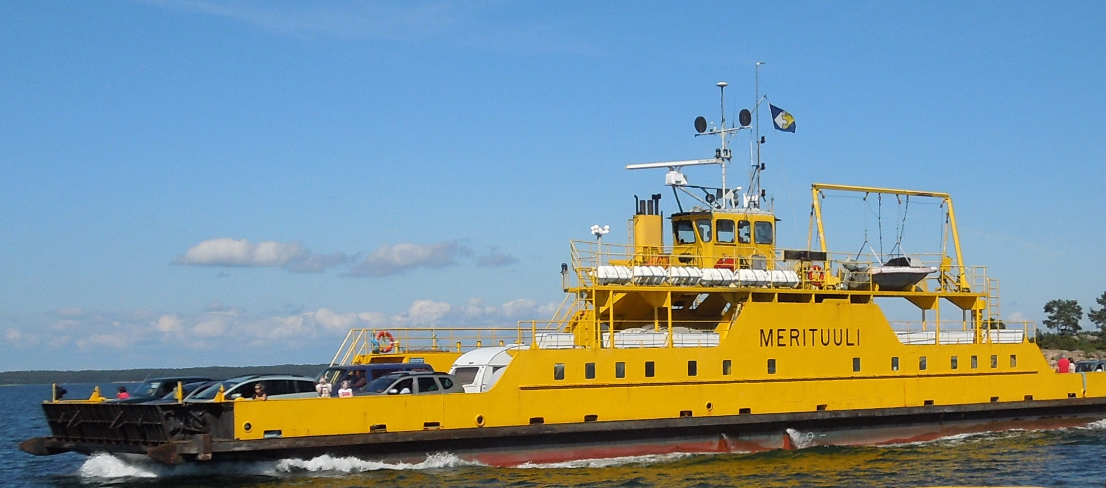 Lautta-alus Merituuli, lautta-alus Obilista kuvattuna.